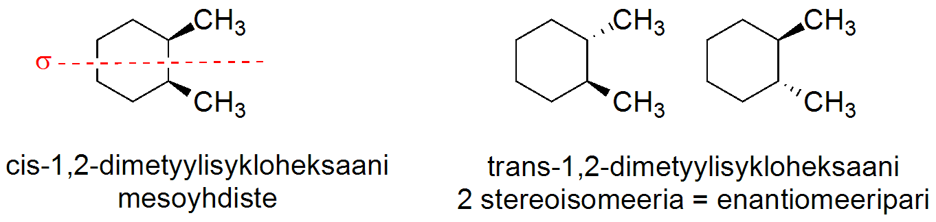 1,2-dimetyylisykloheksaanin stereoisomeerot: cis-(meso)-isomeeri ja trans-isomeerit